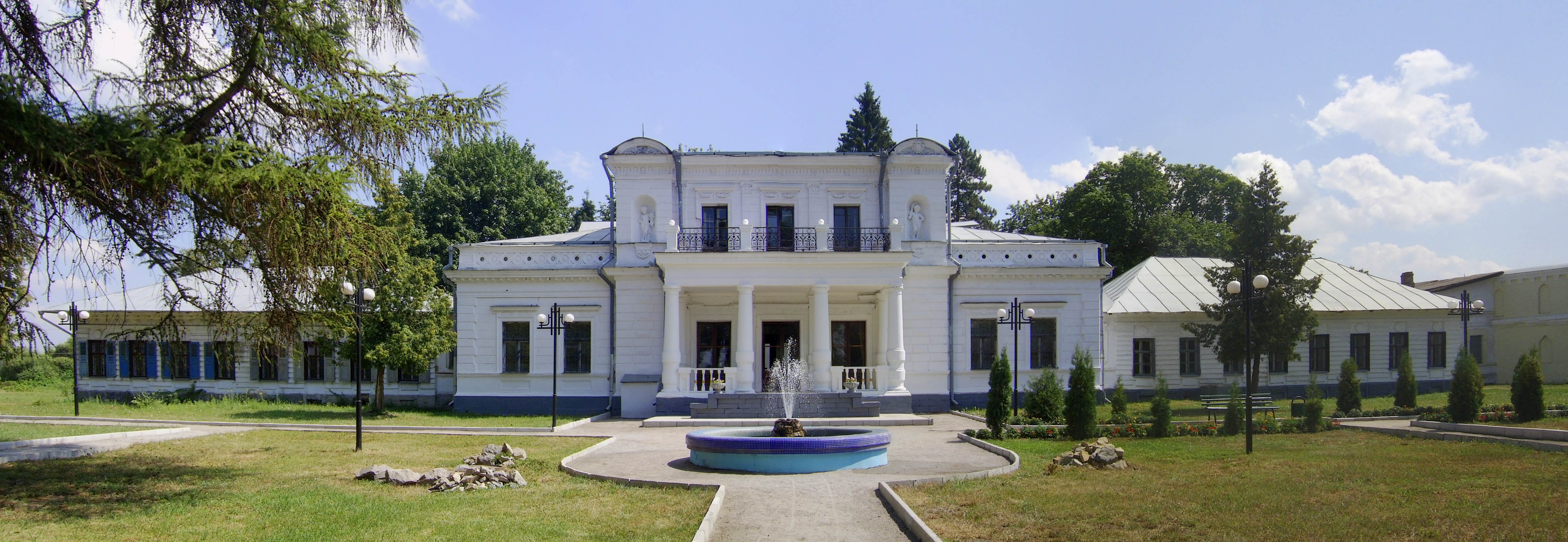 Садиба Кеніга - м. Тростянець